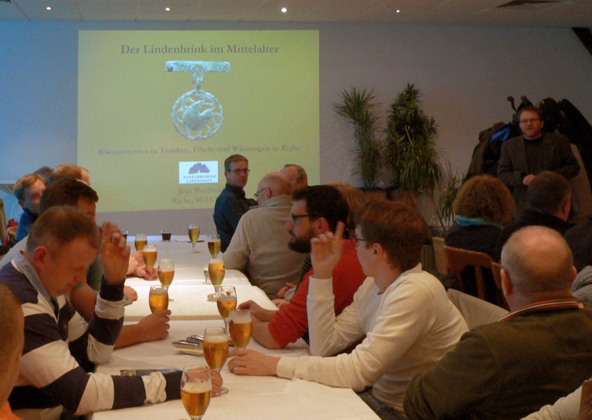 Vortrag zur Wüstung auf dem Lindenbrink durch Jens Berthold